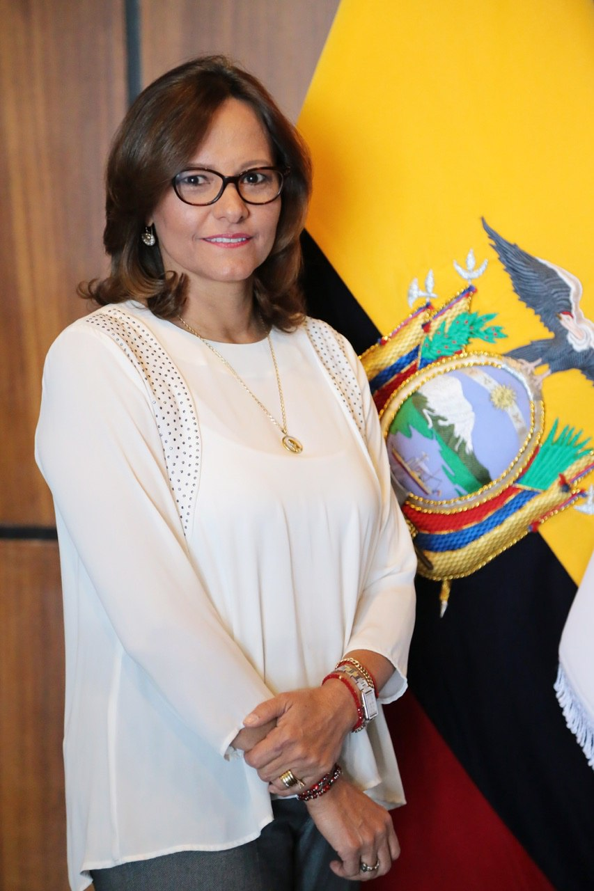 Foto de perfil de la presidenta de la Asamblea Nacional del Ecuador